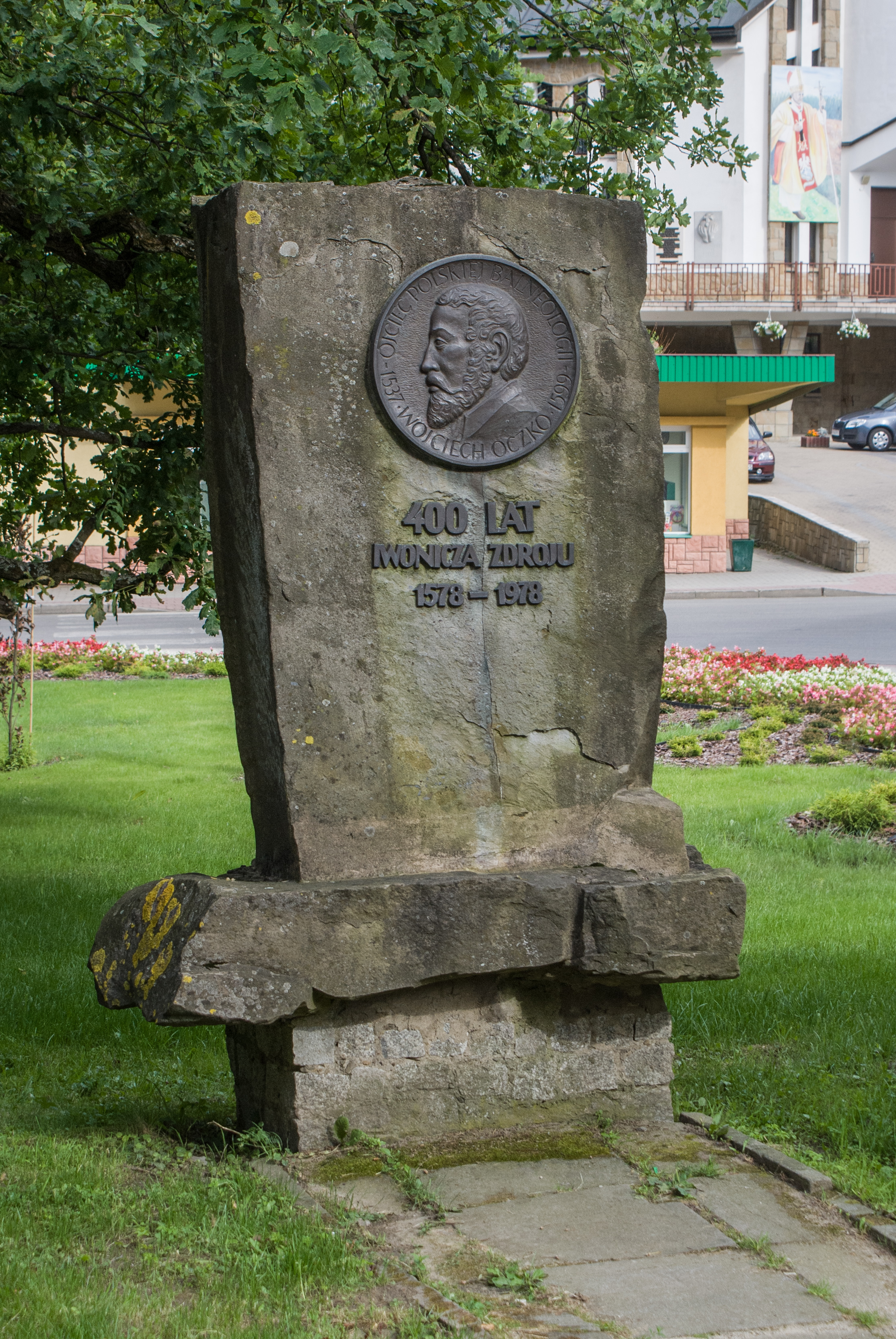 Pomnik upamiętniający Wojciecha Oczko w Iwoniczu-Zdroju.